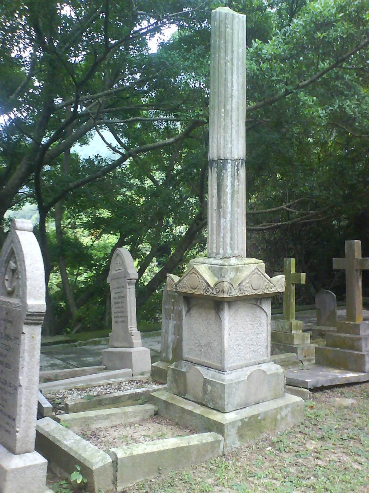 楊衢雲墓